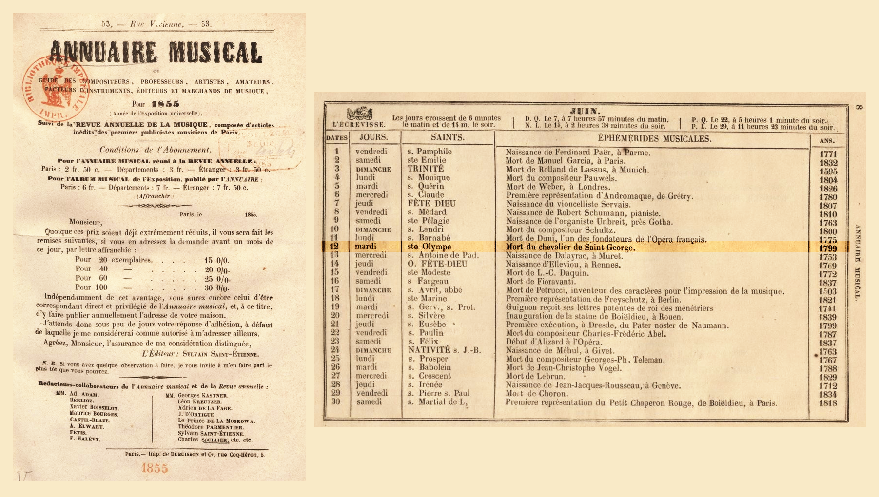 Informations sur la date du décès de Joseph Bologne de Saint-George, dans l'Annuaire musical : ou Guide des compositeurs, professeurs, artistes, amateurs... : suivi de la Revue annuelle de la musique, composée d'articles inédits des premiers publicistes musiciens de Paris